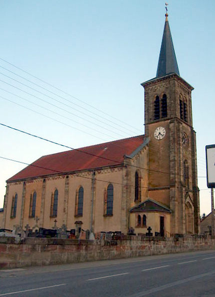 Ceci est l'église Saint-Pierre de la paroisse d'Alsting en Moselle, France.